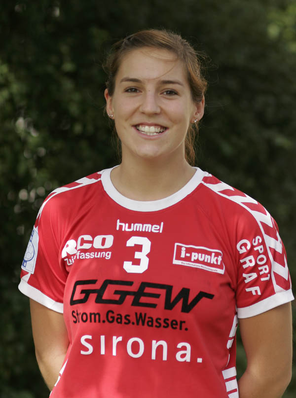 Isabell Nagel am 2. September 2006 vor der Bensheimer Weststadthalle